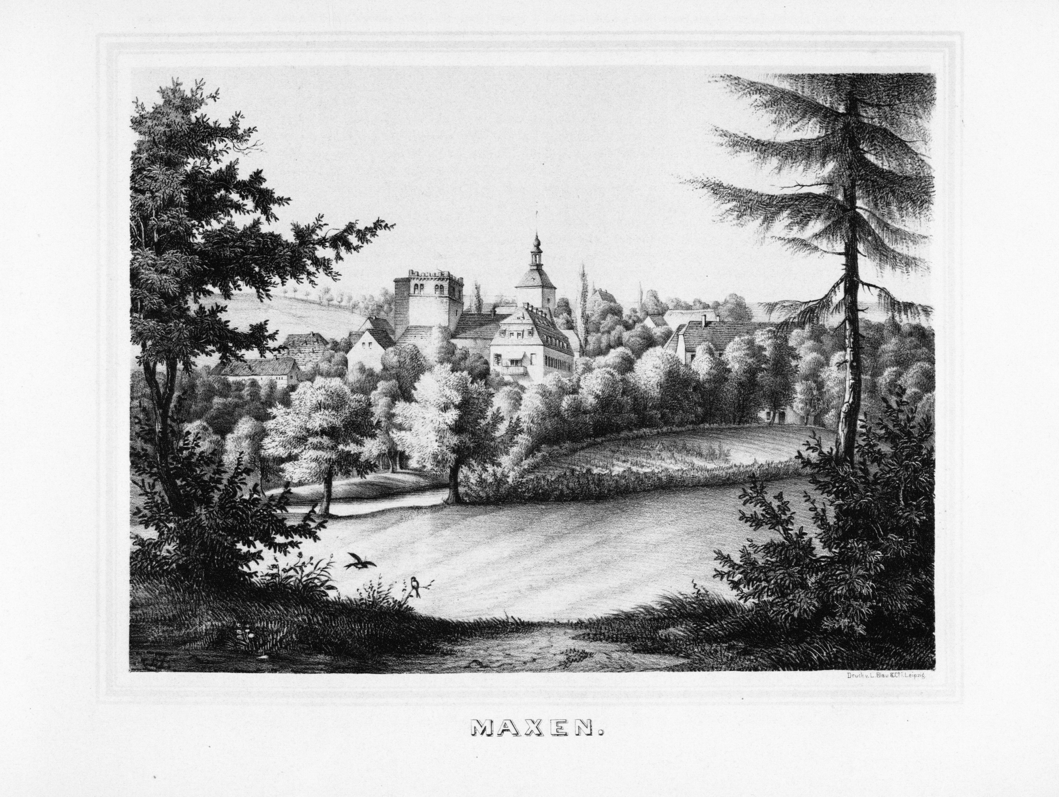 Maxen aus: Album der Rittergüter und Schlösser im Königreiche Sachsen Meissner Kreis Section: II